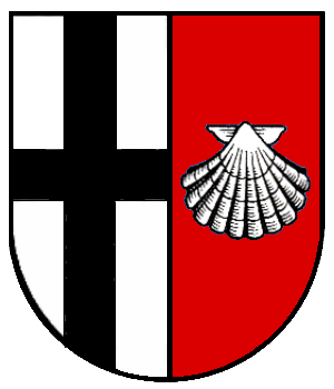 Wappen von Nordhausen-Harthausen in Unterschneidheim, Germany, Baden-Württemberg